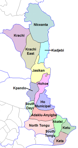 Вольта (Гана)